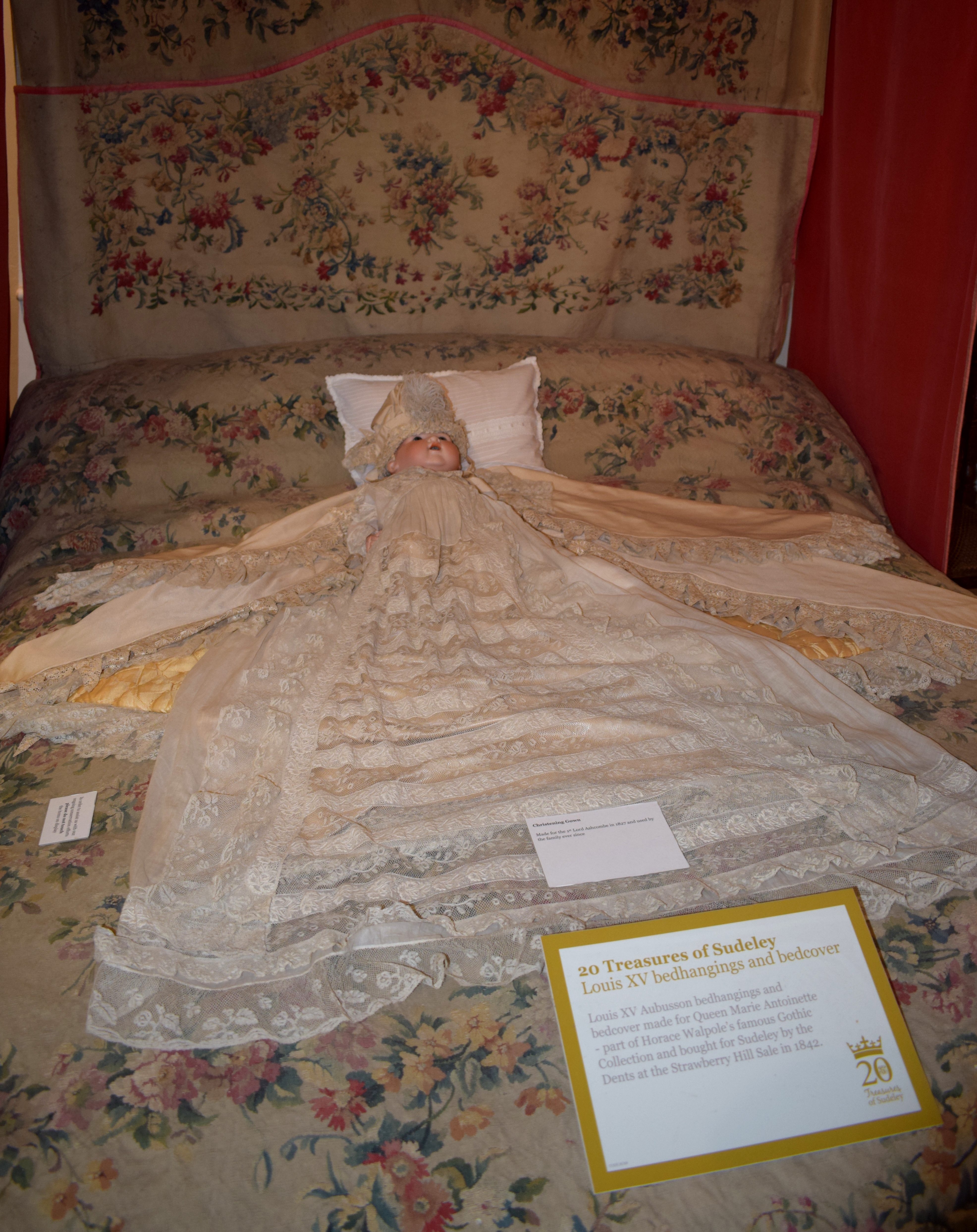 Taufkleid des Geschlechts der Sudeleys in Sudeley Castle